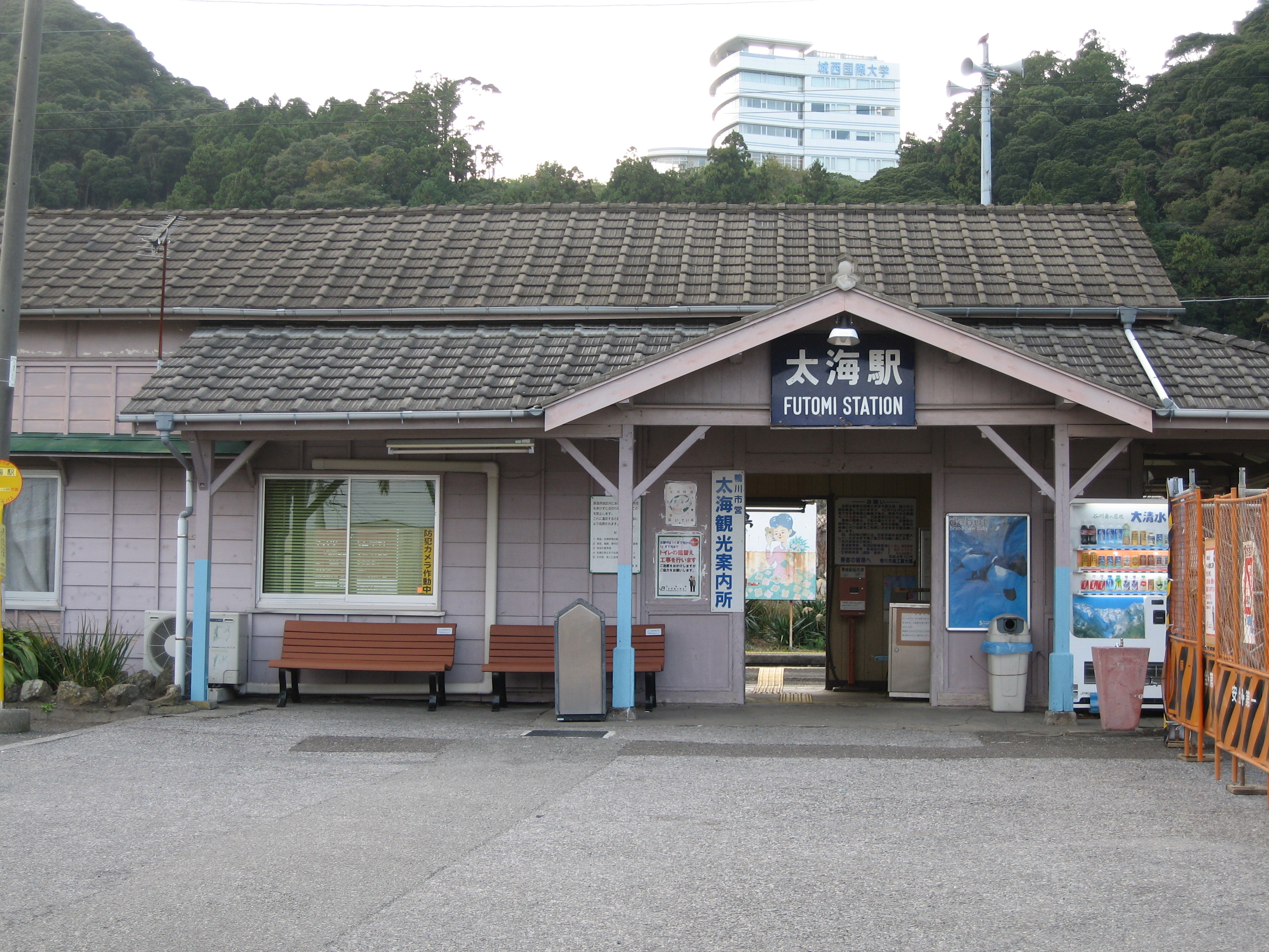 Futomi station, Uchibo Line, Chiba, Japan, 太海駅